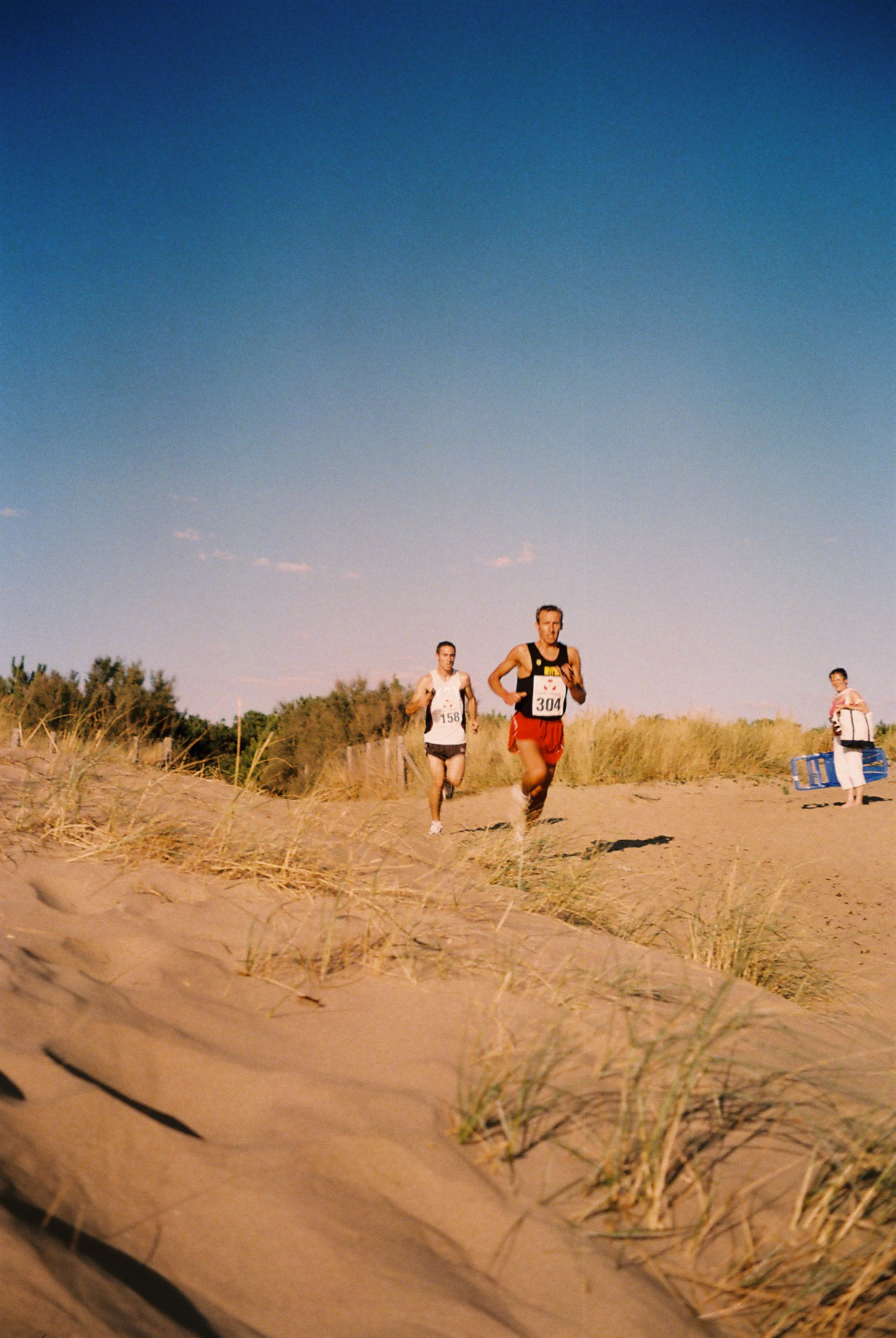 I have the permission of the author to publish this picture. Photos des foulées des dunes.